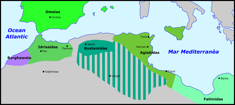 Magrèb dins lo corrent dau sègle IX.